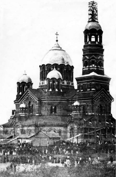 Самара. Строительство Кафедрального собора. Фотография. ~1880-е годы.